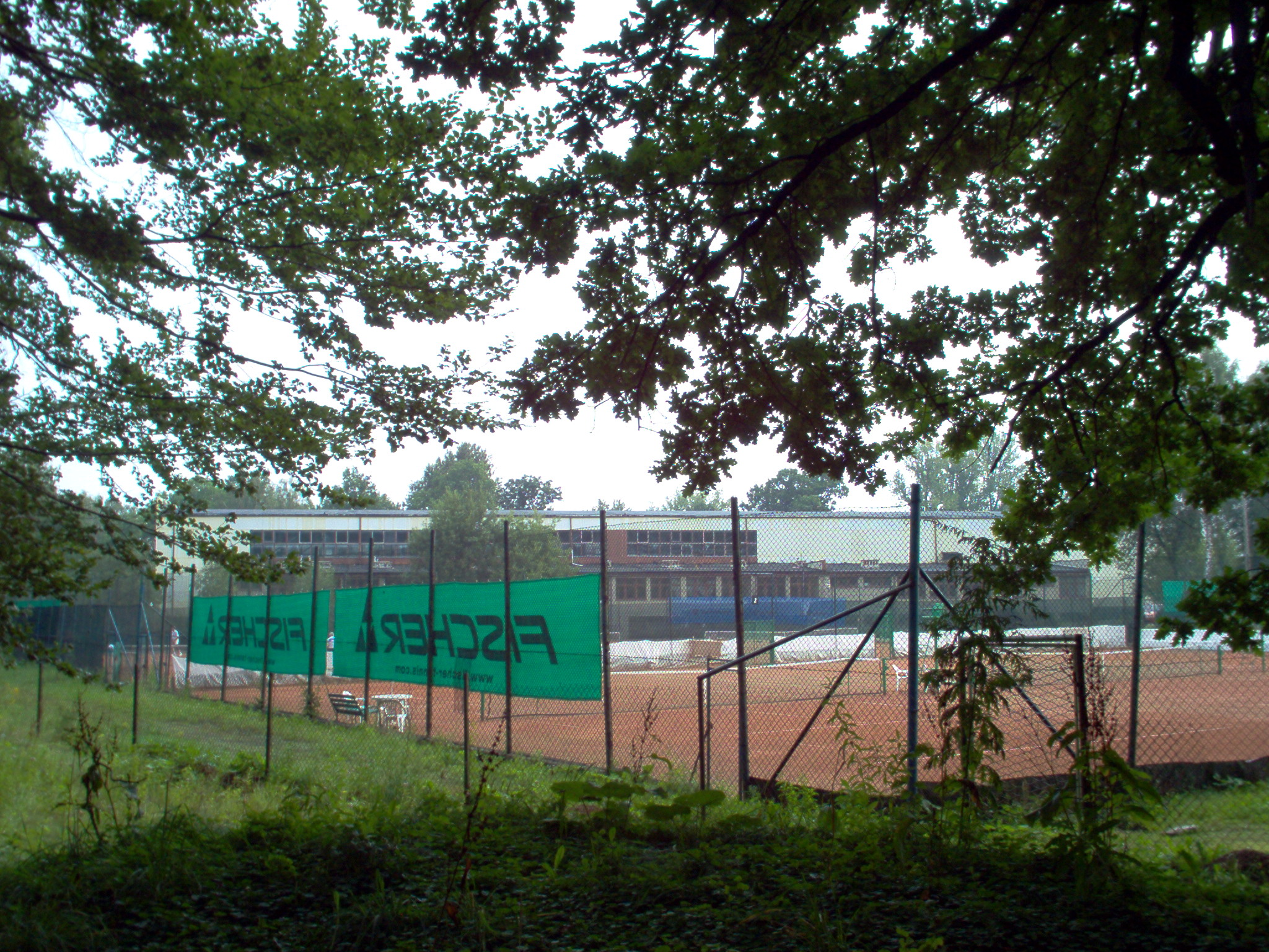 description:Giszowiec - korty tenisowe przy ulicy Pszczyńskiej. Author:Ewkaa